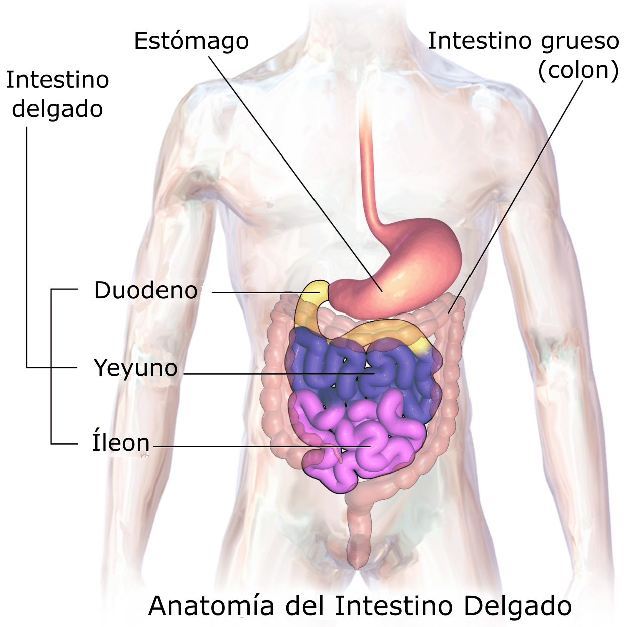 Intestino delgado. Ver una animación completa de este tema médico.full animation